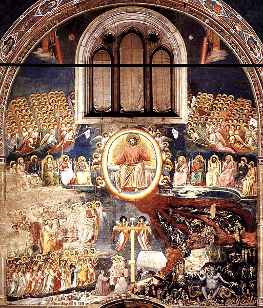 Last Judgment scene, Cappella Scrovegni a Padova